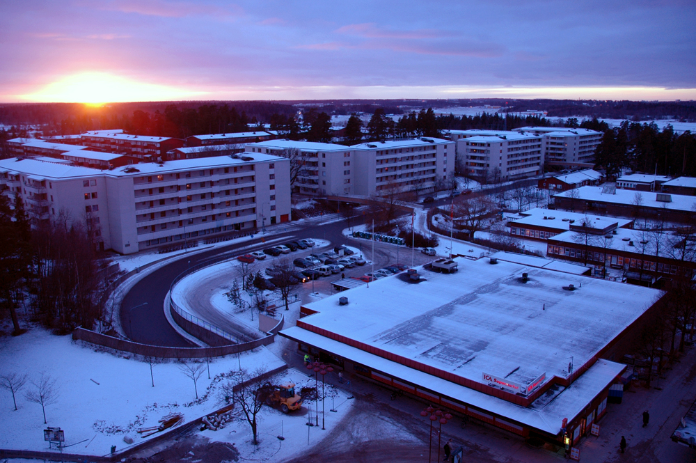 Mariehamnsgatan i Akalla.